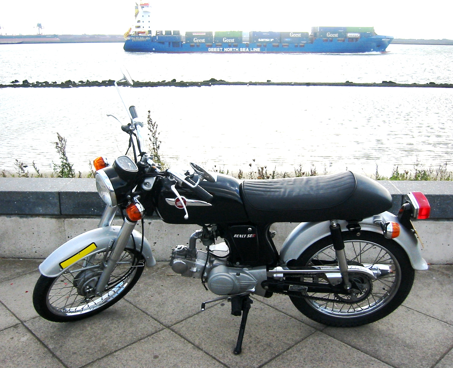 Eigen foto. Viertakt bromfiets die in Japan nog steeds wordt gemaakt.